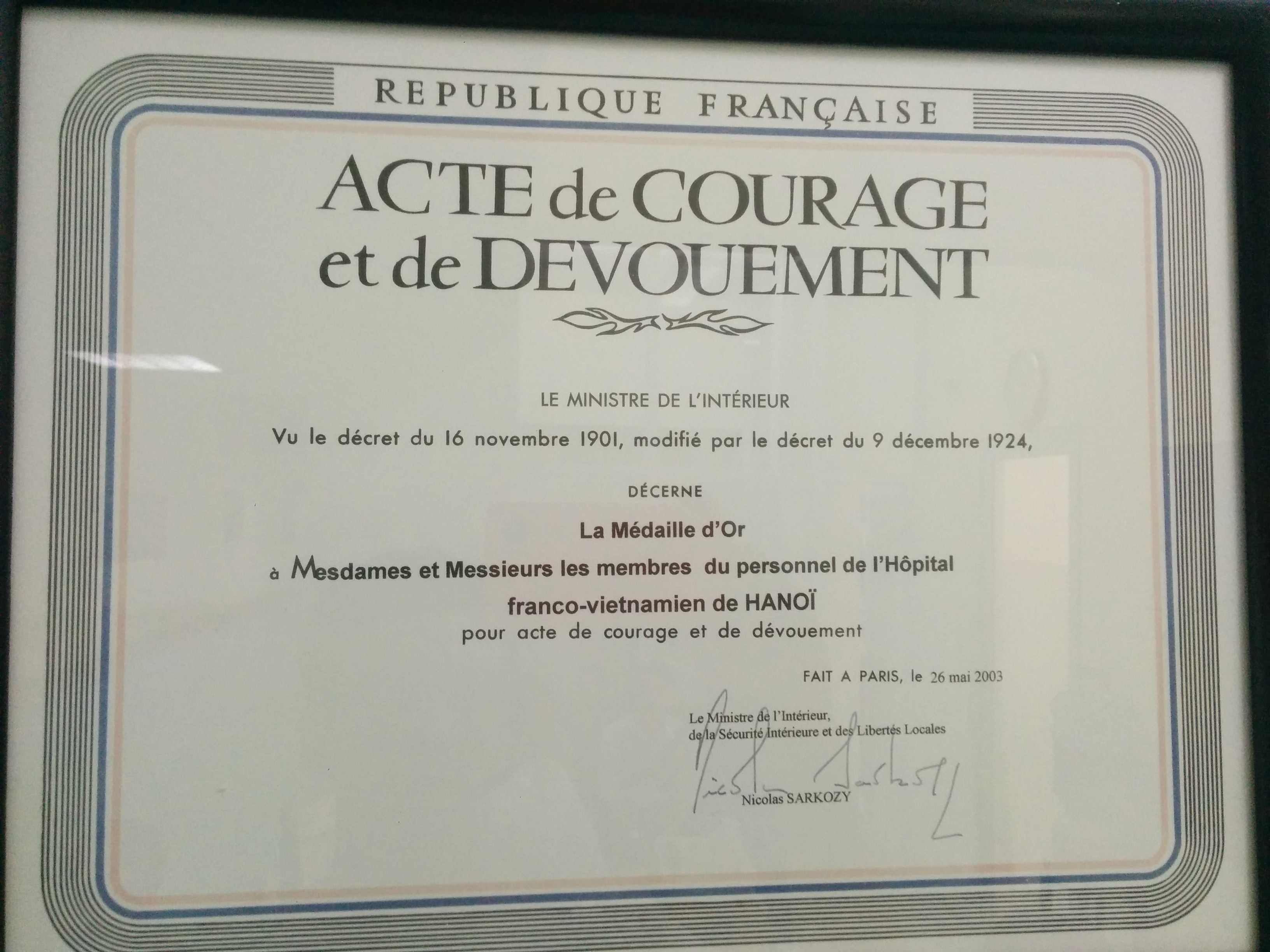 La Médaille d'Or à Mesdames et Messieurs les membres du personnel de l'Hôpital franco-vietnamien de Hanoï pour acte de courage et de dévouement. Le Ministre de l'Intérieur, de la sécurité intérieure et des Libertés locales. Nicolas Sarkozy